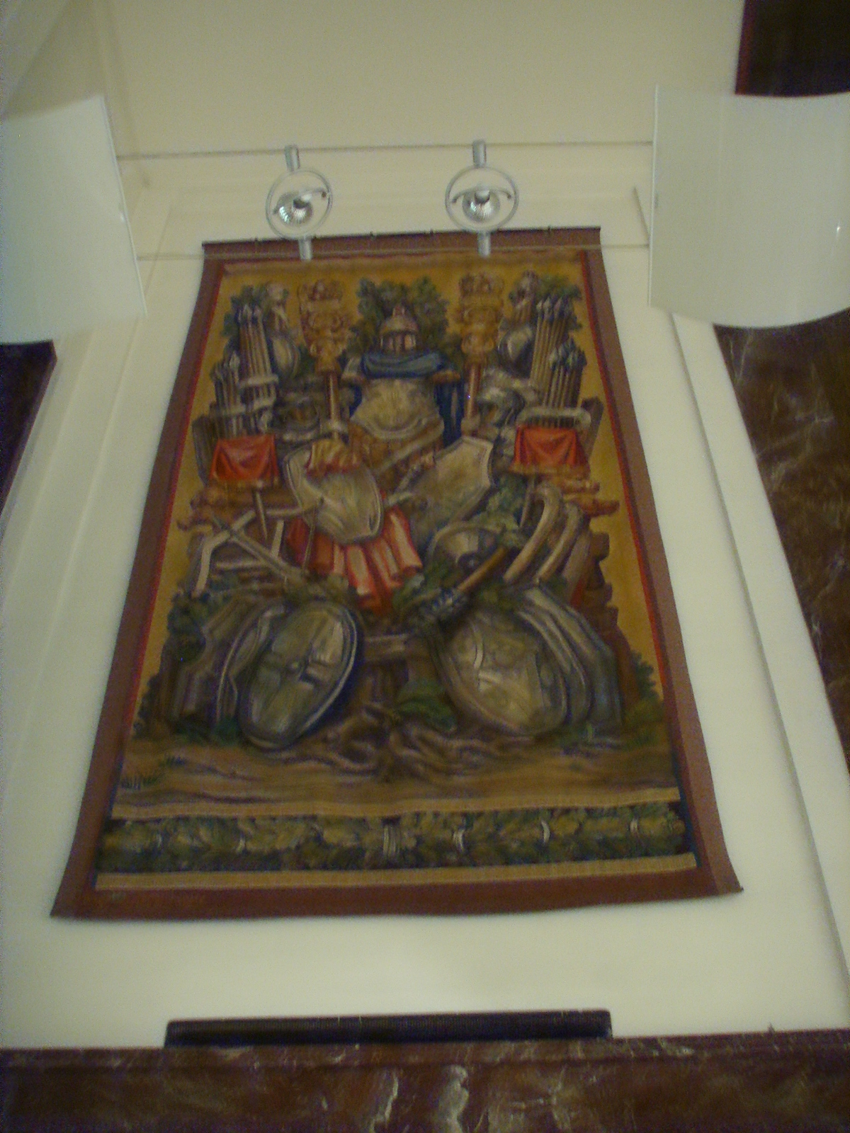 Palazzina reale, arazzo